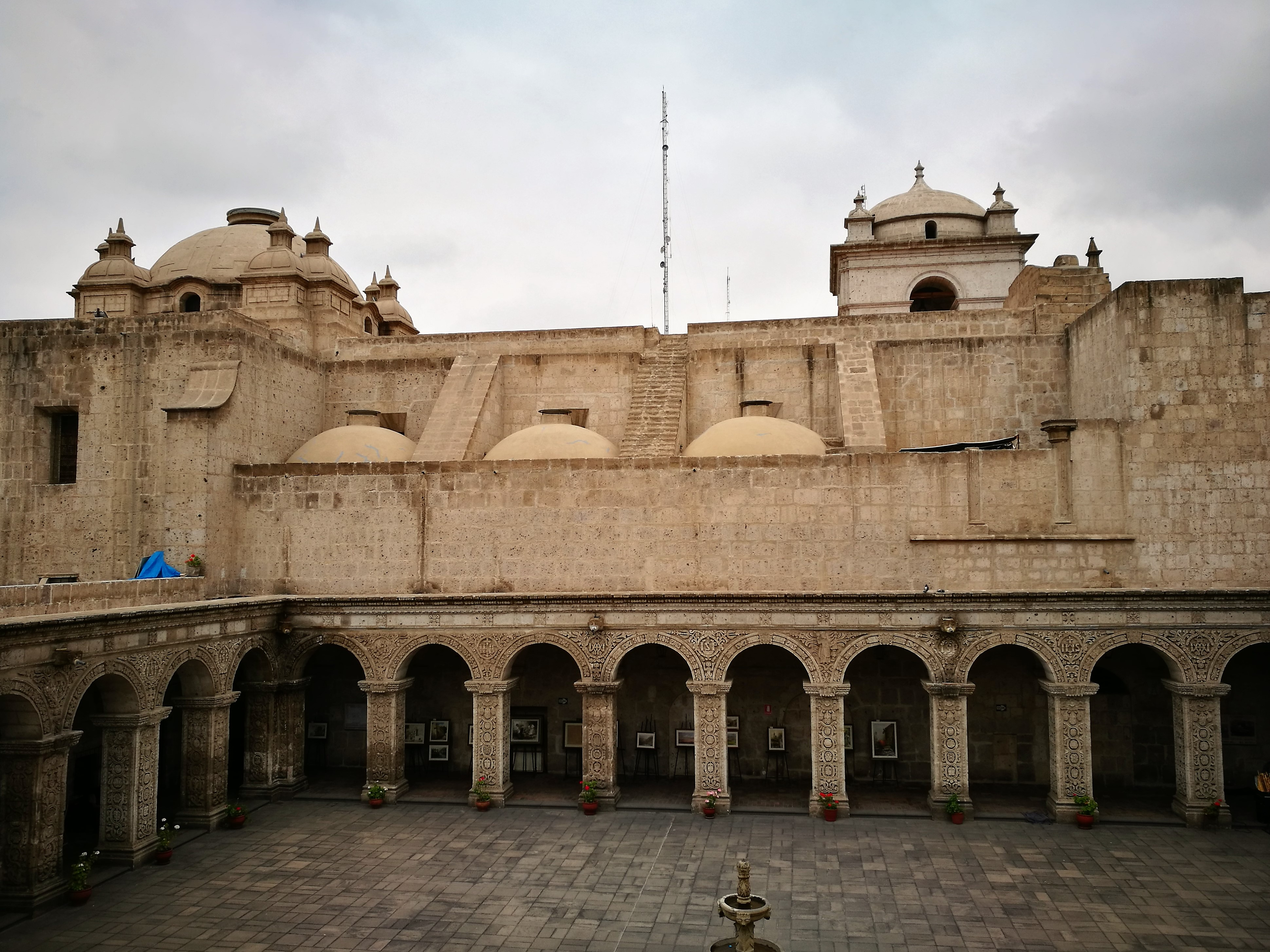 Arcs de l'església dels jesuïtes d'Arequipa